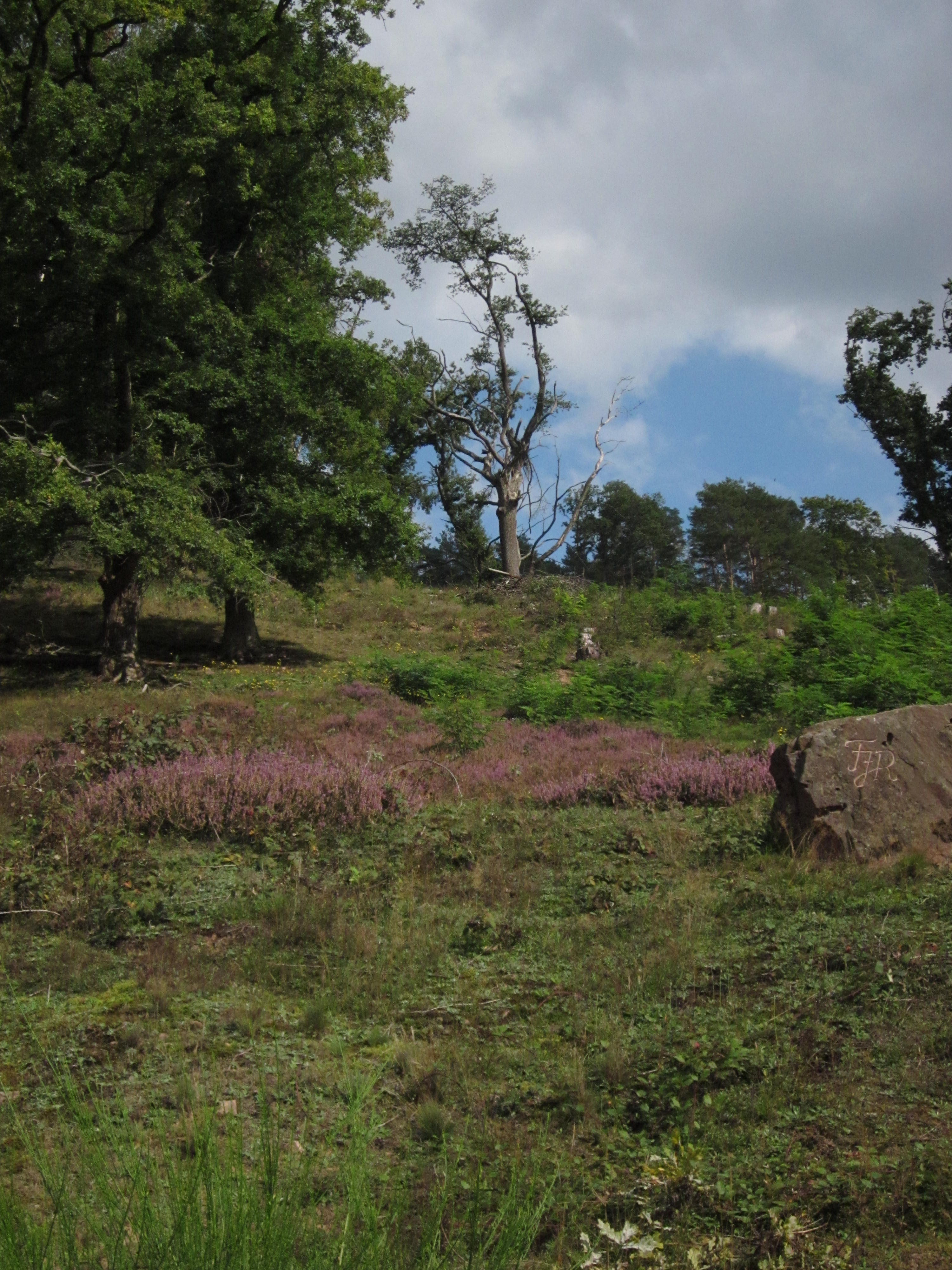 Naturschutzgebiet Romberg bei Lohr, Sept. 2014